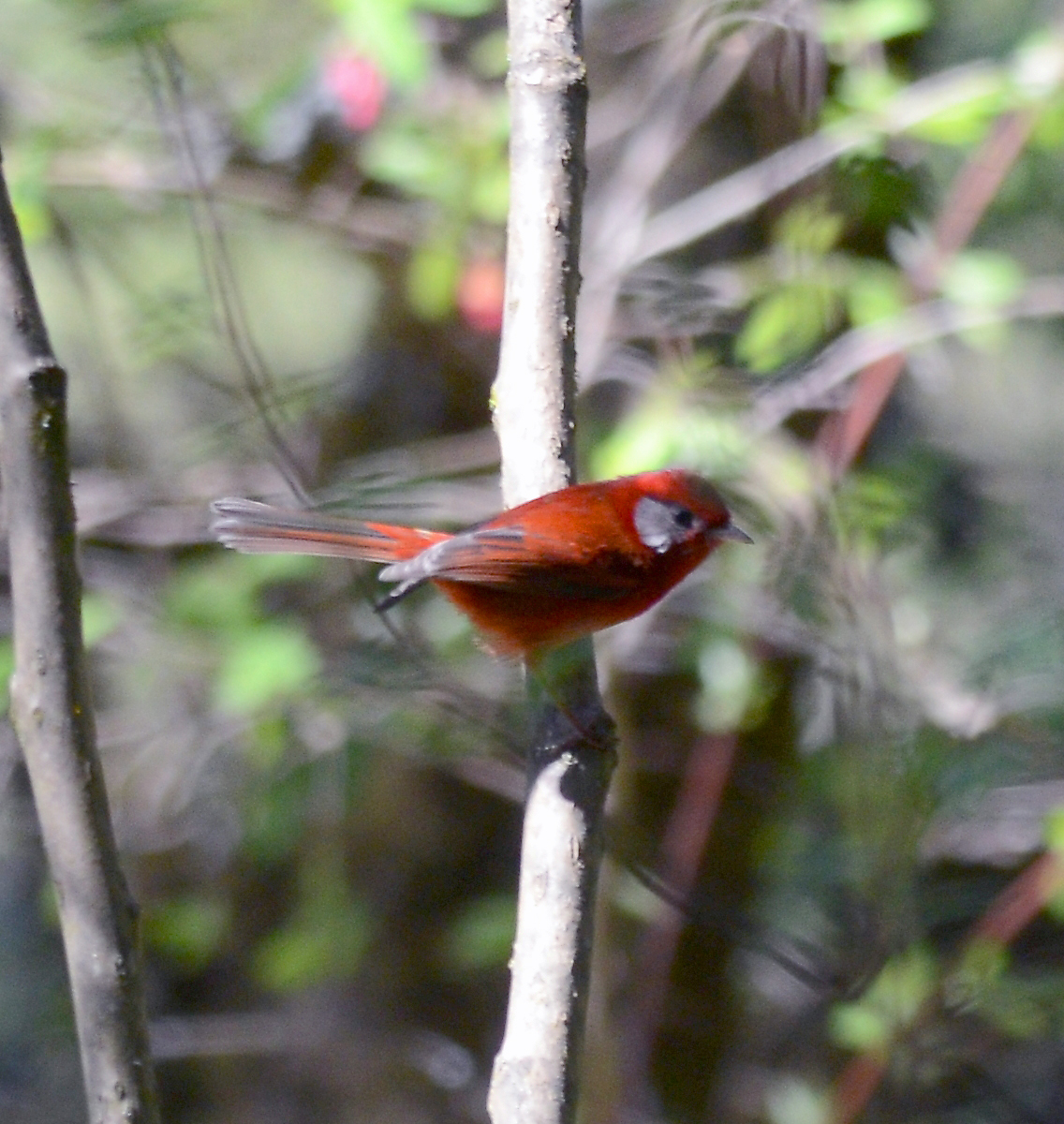 Campamento los Conejos, El Chico, Hidalgo, México